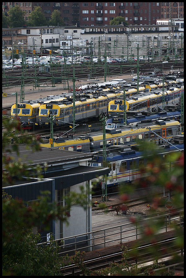 Några av Västtrafiks pendeltåg uppställda vid Göteborg C.